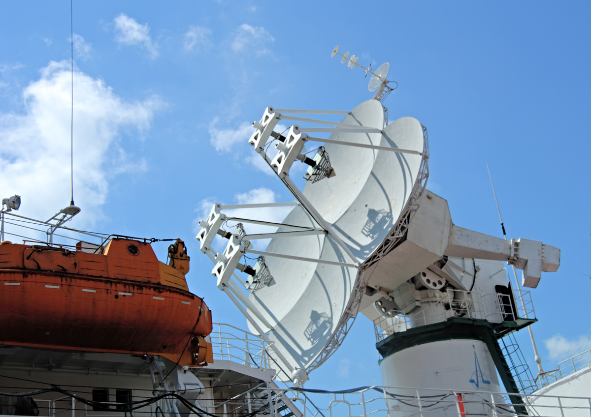 Антенна СМ-244 "Ромашка" комплекса приема телеметрии на научно-исследовательском судне "Космонавт Виктор Пацаев"